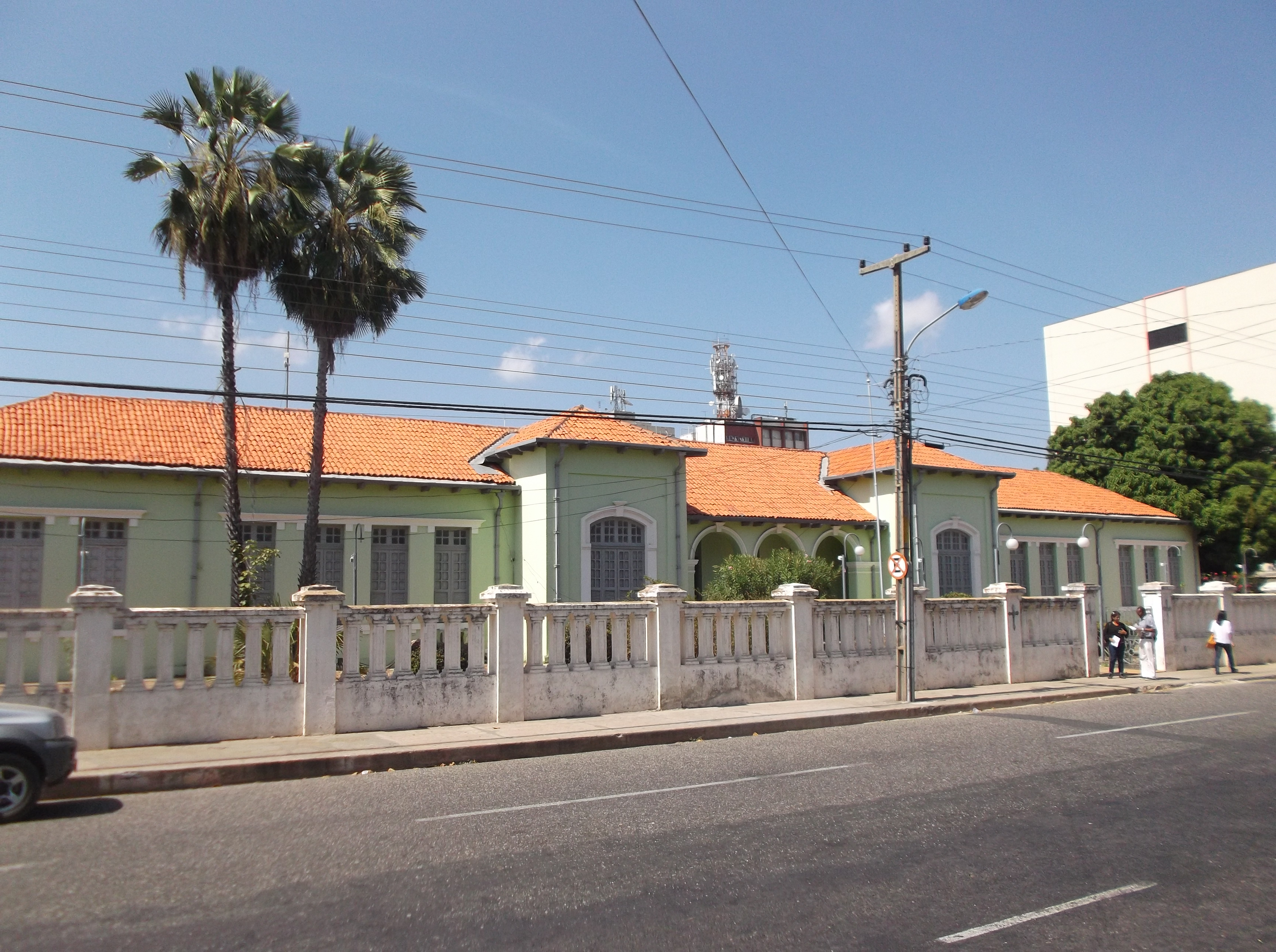 Sede da Biblioteca Estadual do Piauí